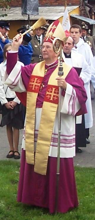 Archbishob Henryk Józef Muszyński